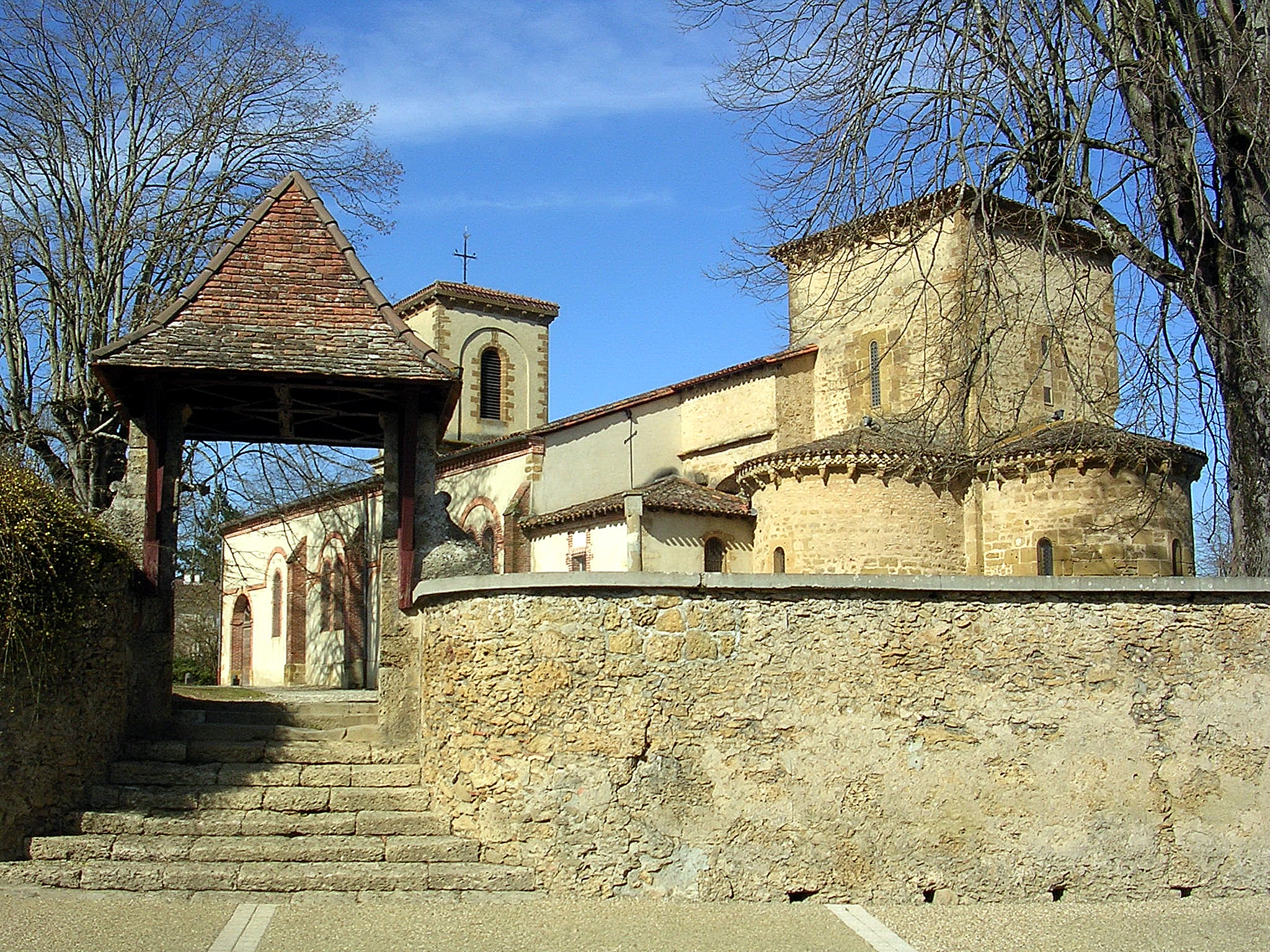 Vue extérieure de l'église de Saint-Pierre-du-Mont (Landes, France)